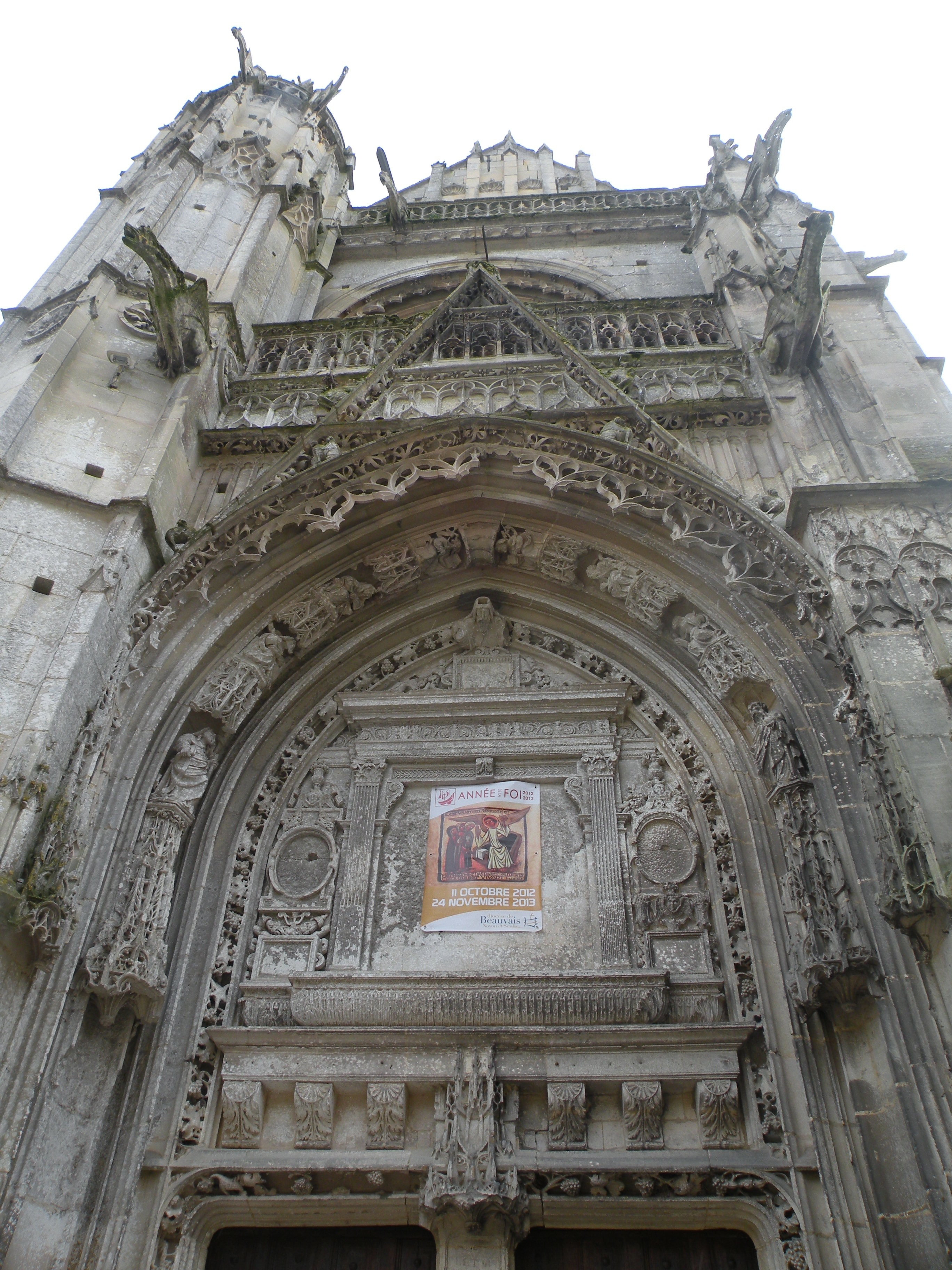 Église de chaumont en vexin portail